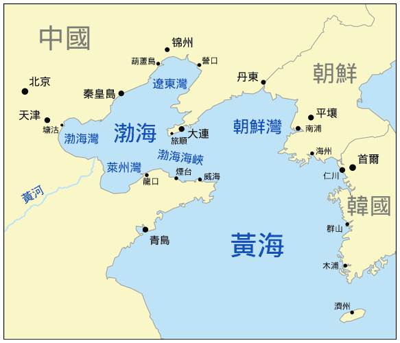 渤海及周邊地區